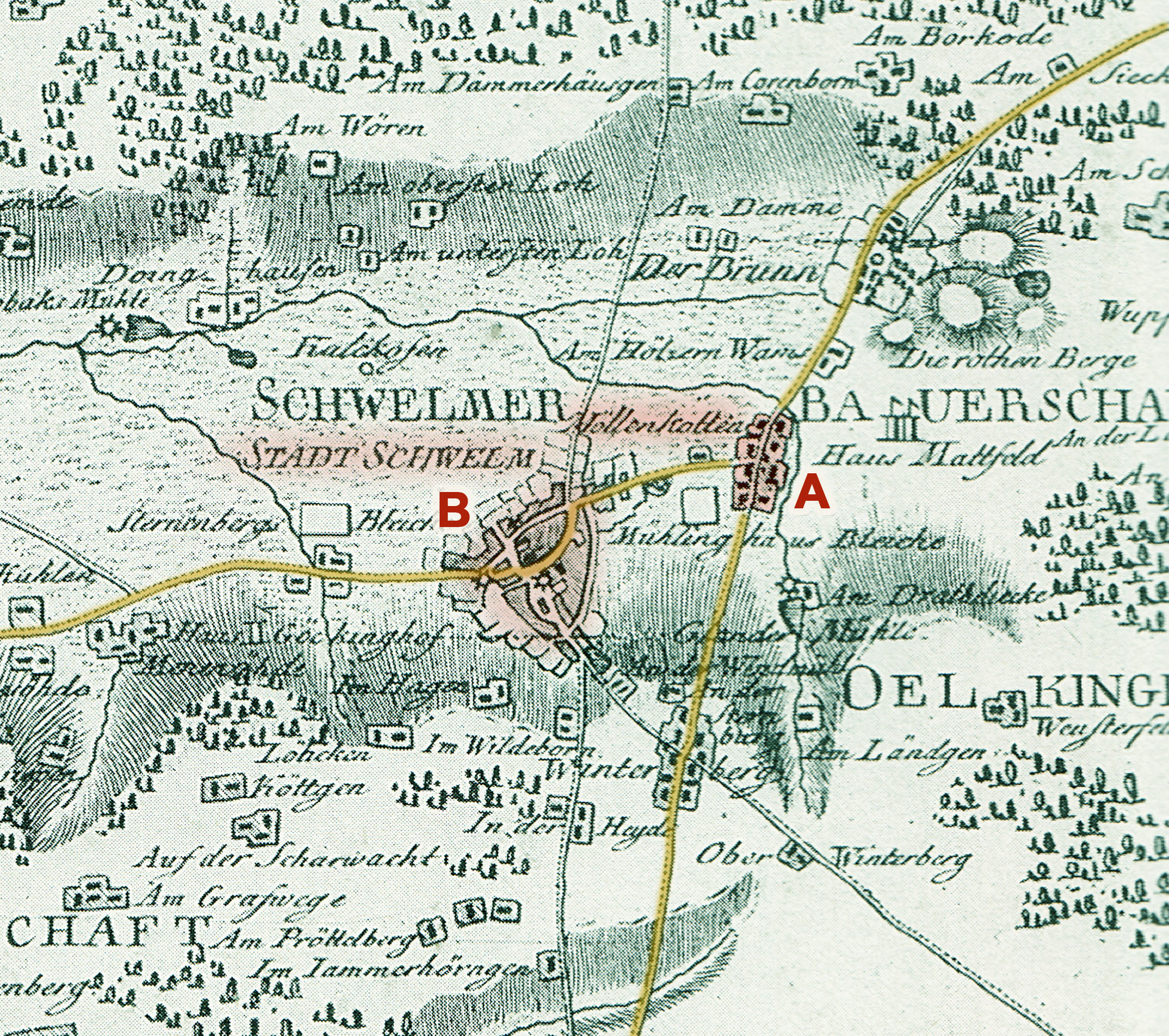 Ausschnitt aus der Karte "Situations Charte vom Fabrickendistrikte im Hochgericht Schwelm", 1788. Entwurf: Friedrich Christoph Müller, Kupferstich: Georg Friedrich Jonas Frentzel. Original im Museum Haus Martfeld, Schwelm. Ausschnitt wurde nachkoloriert und mit farbigen Markierungen versehen. Er zeigt einen Bereich um die Stadt Schwelm (markiert "B"), mit Dorf Möllenkotten ("A") und alten Fernstraßen (gelb).